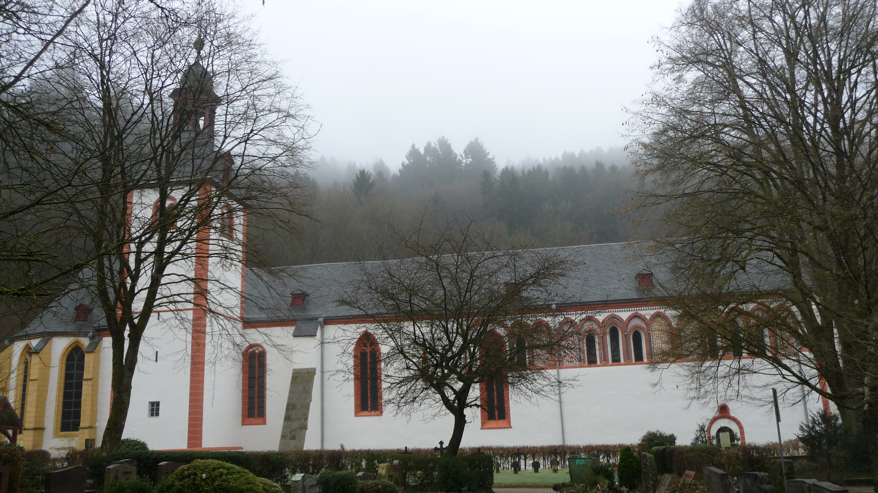 Abtei Sayn, Nordseite der Abteikirche, nach der Renovierung 2015